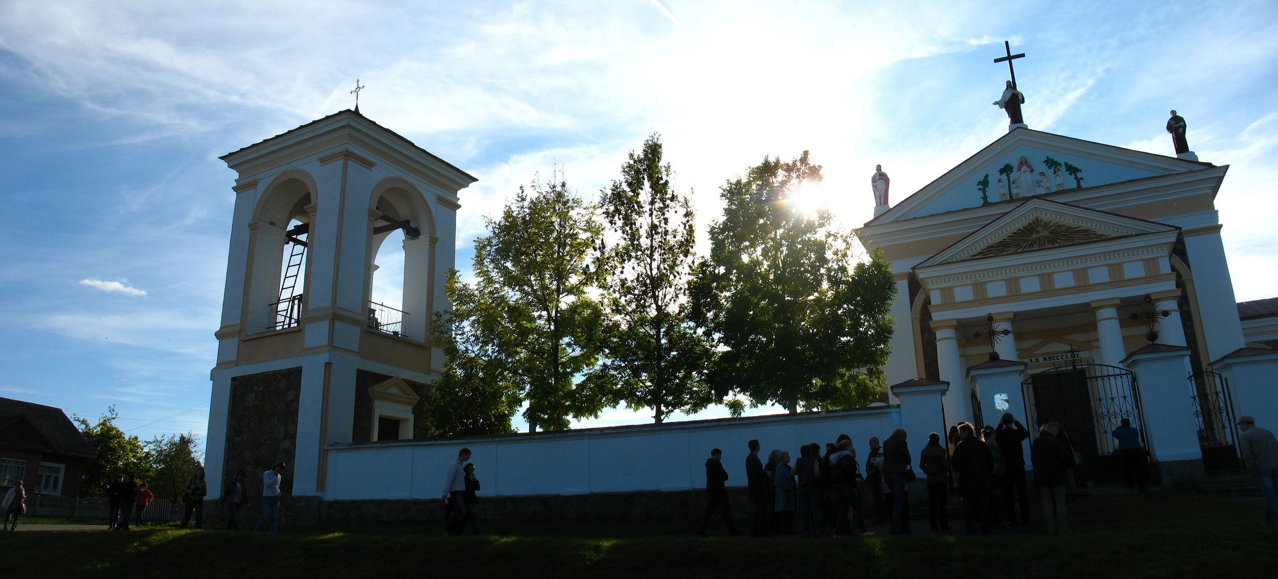 Беларуская (тарашкевіца): Жалудок